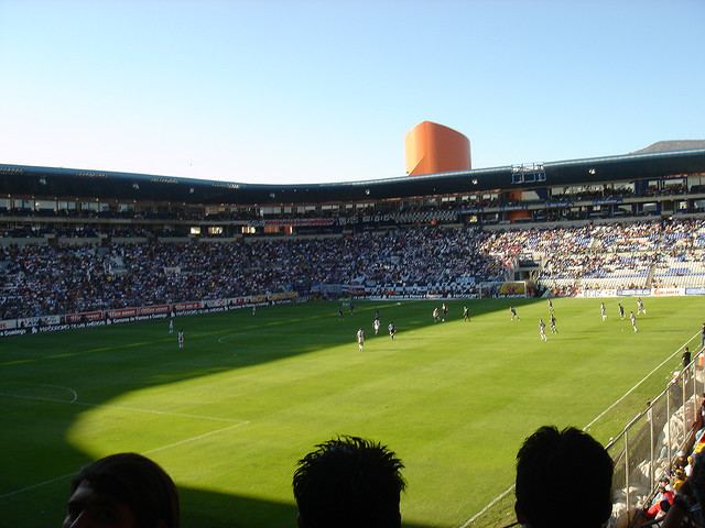 En el campo, Pachuca vs Pumas